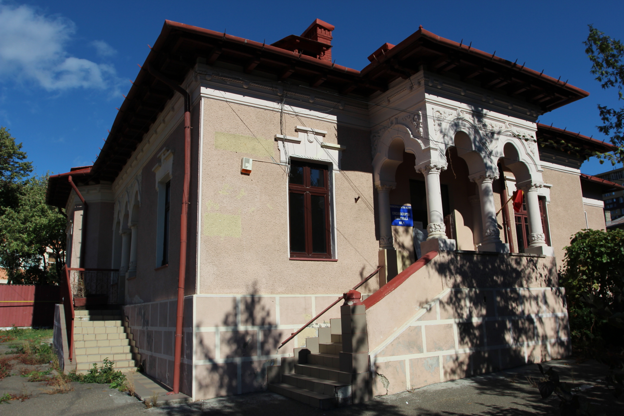 Casă str.Paharnicului